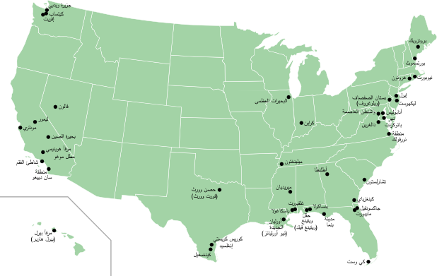 خارطة تظهر فيها القواعد البحرية للبحريَّة الأمريكيَّة.